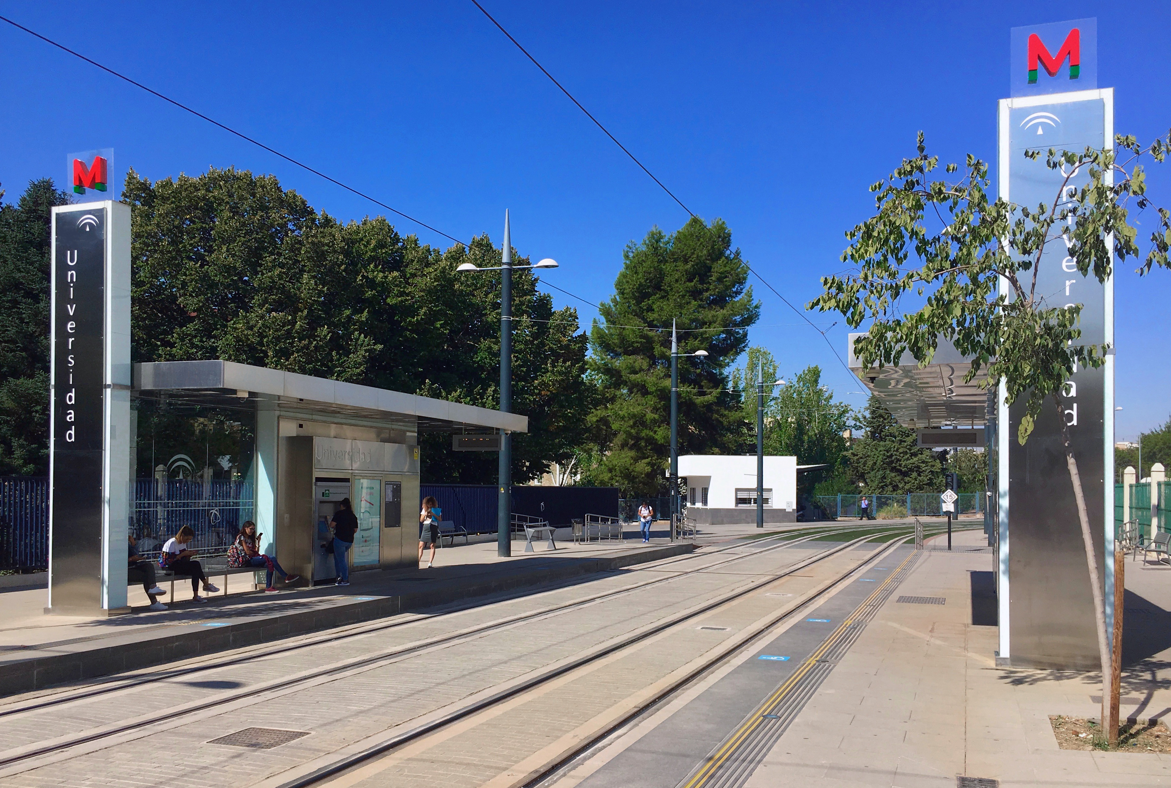 Estación de Universidad del Metro de Granada, situada en el Campus de Fuentenueva.